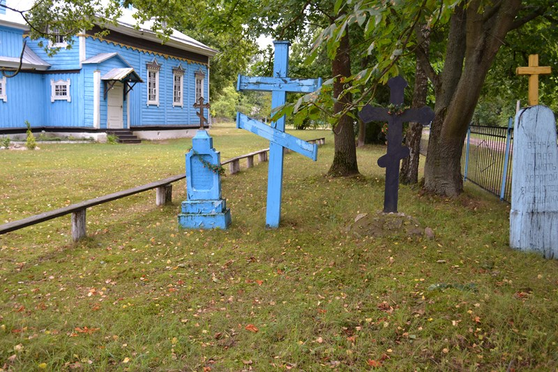 Навасёлкі (Навасёлкаўскі сельсавет, Кобрынскі раён). Міхайлаўская царква